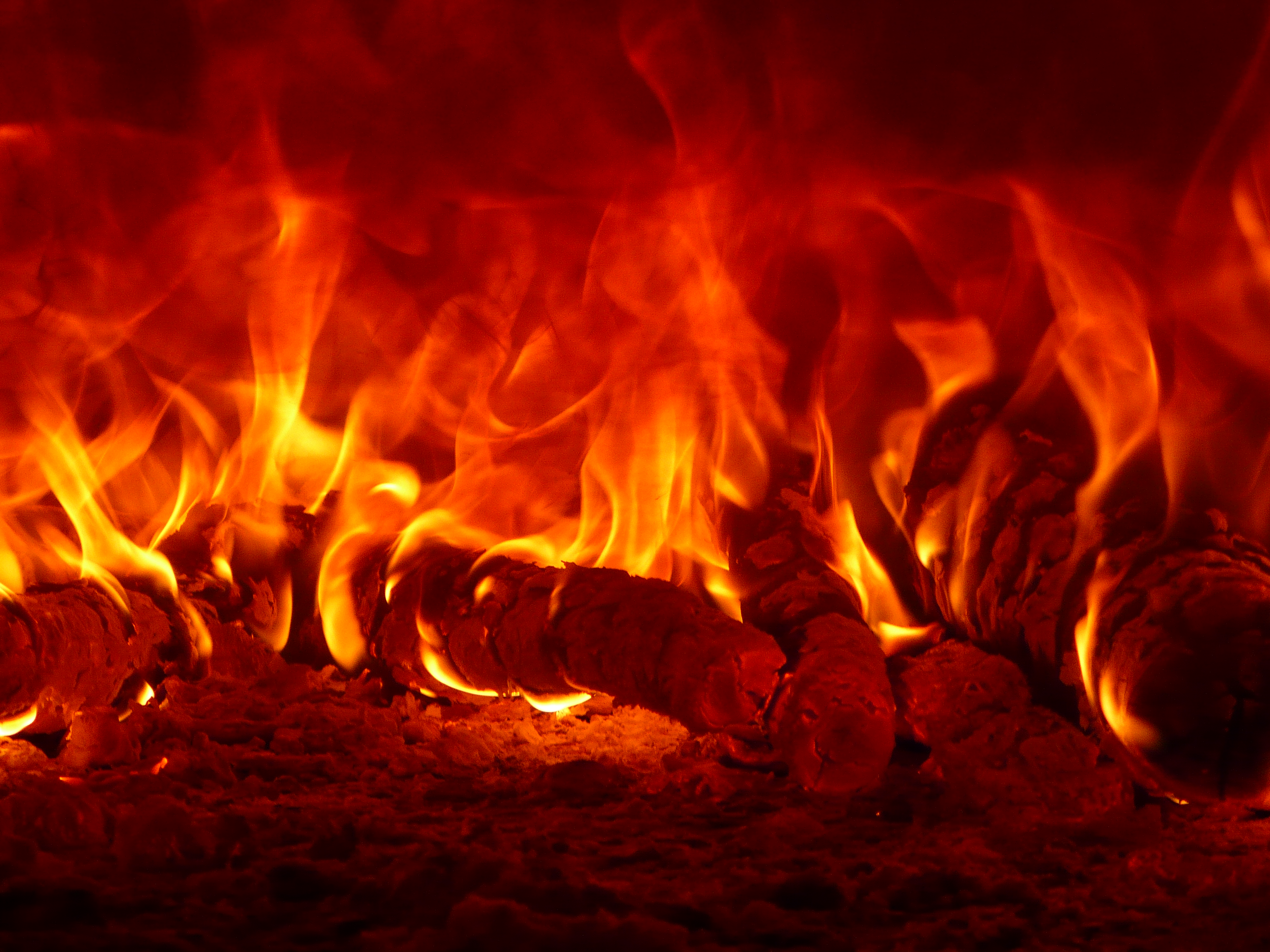 Odunların yandığı ateş